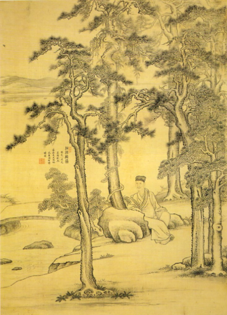 Portrait de Zhu Kuishi peint en collaboration par les peintres chinois Xie Bin et Xiang Shengmo. Cette peinture représente Zhu Kuishi, membre d'une famille noble, assis sur un rocher, peint par Xie Bin. L'arrière plan et les arbres sont peints par Xiang Shengmo. Œuvre datée 1653. Rouleau mural, encre et couleur claire sur soie. ses dimmensions en centimètres sont: 69,2x49,7. Conservée au Musée impérial de Beijing.